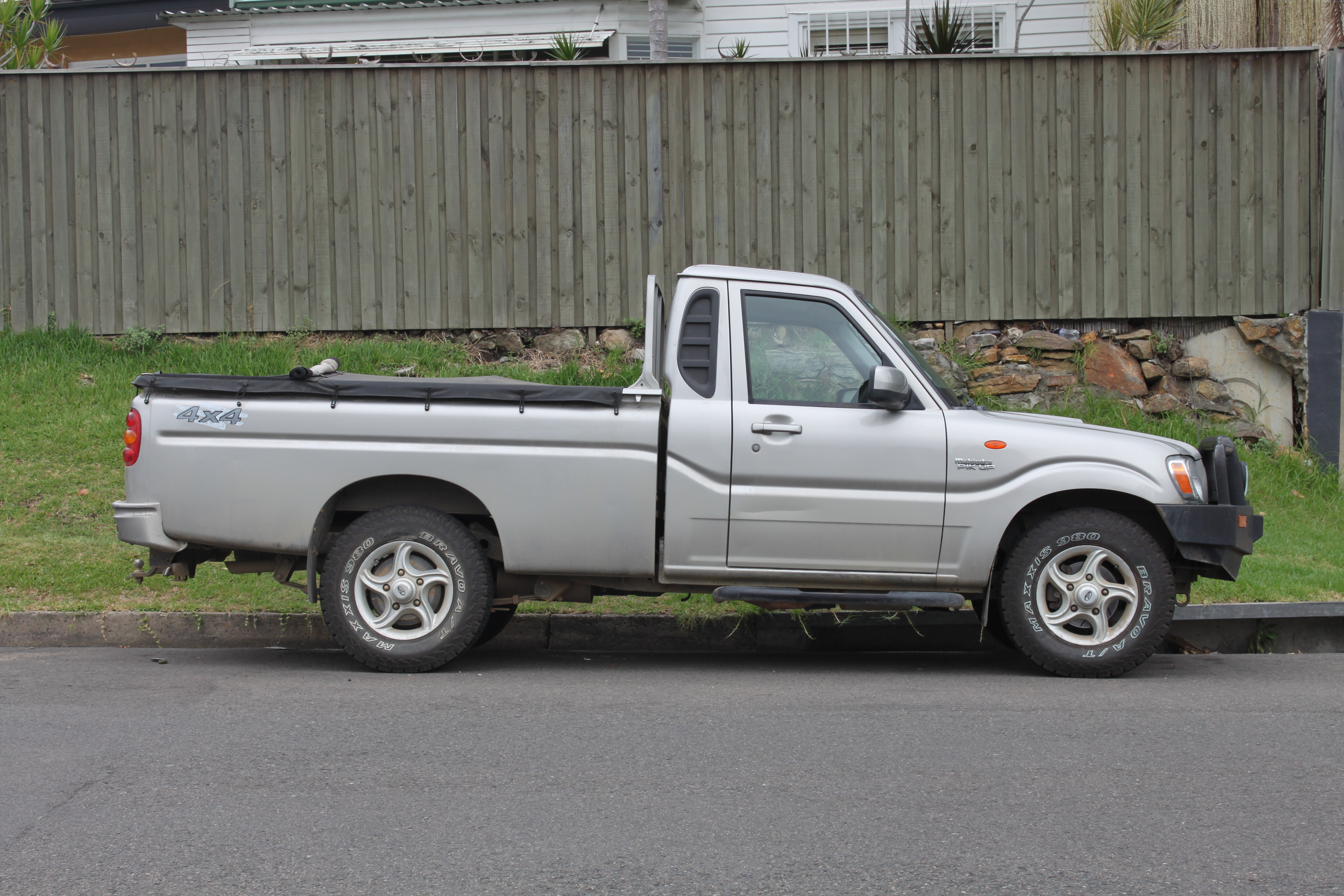 Mahindra Pik-Up S5